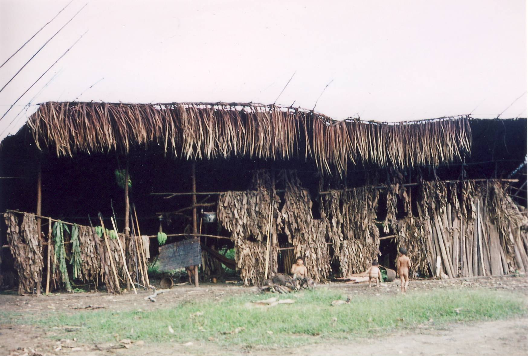 Das Innere eines Schabono mit Frau und Kindern